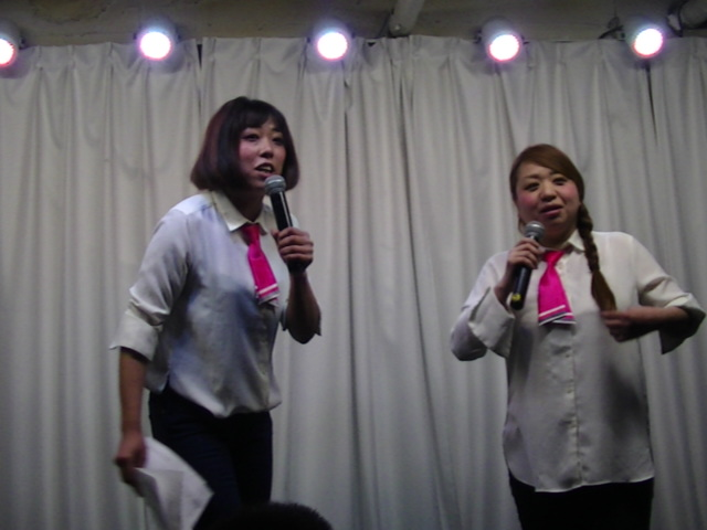 ちょーちんあんこー (2018年2月)